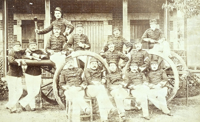 Artilleurs du 33e régiment d'artillerie en 1880, peu après leur installation à la caserne d’Aboville (ou caserne des Dunes) à Poitiers